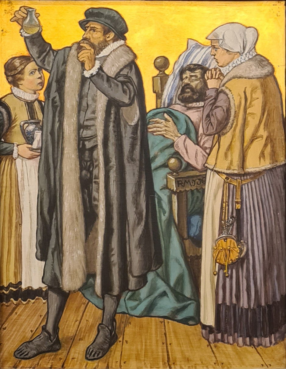 Gesellschaft zu Mittellöwen, Vennerstube, Thomas Schöpf